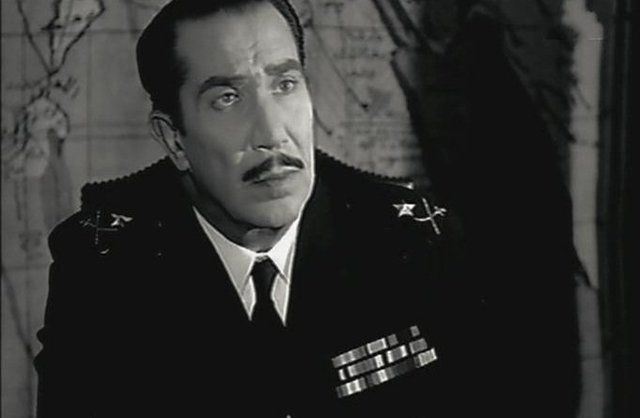 صورة من فيلم حياة أو موت للممثل يوسف وهبي في دور حكمدار لعاصمة.